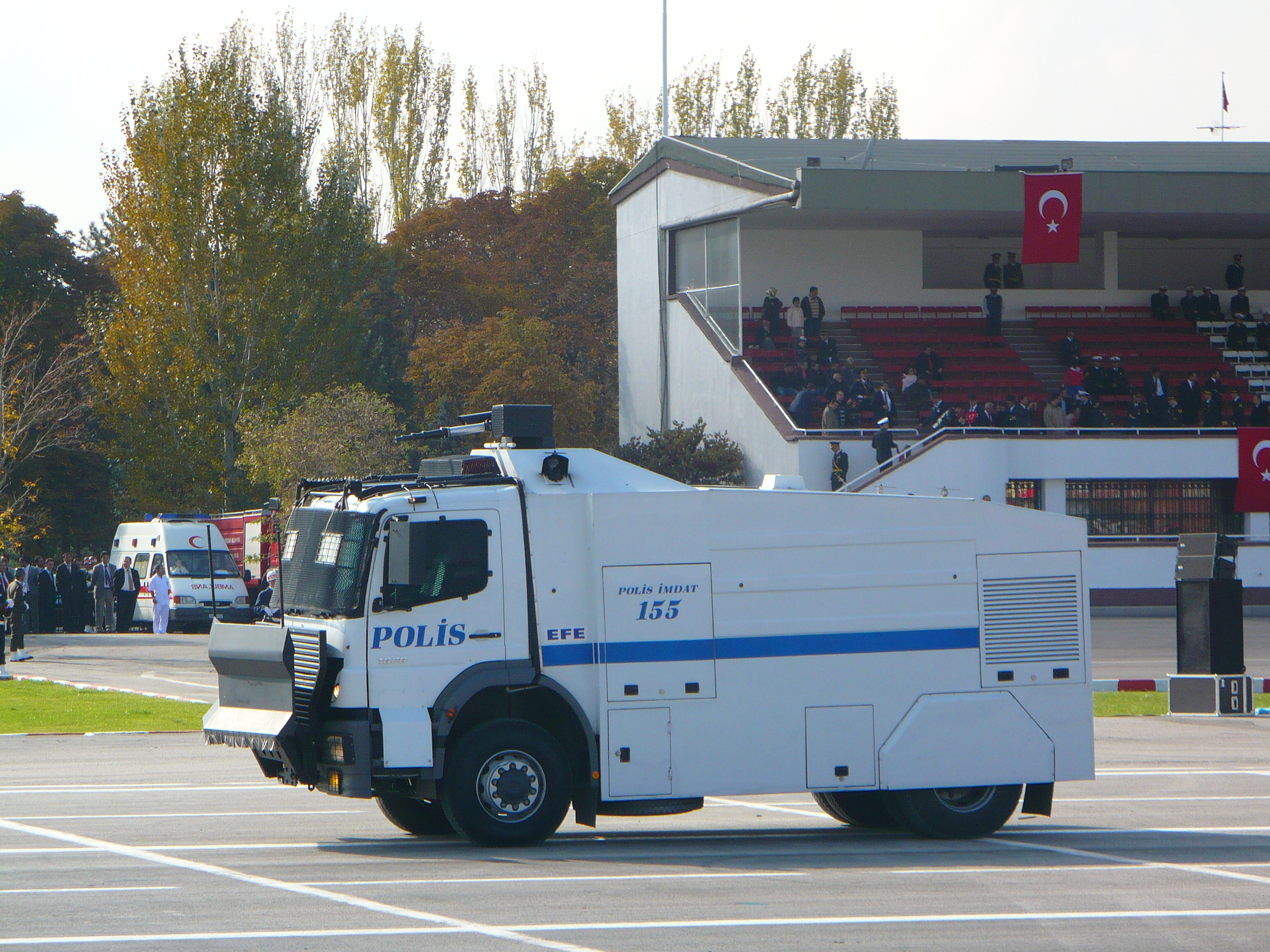 TOMA aracı